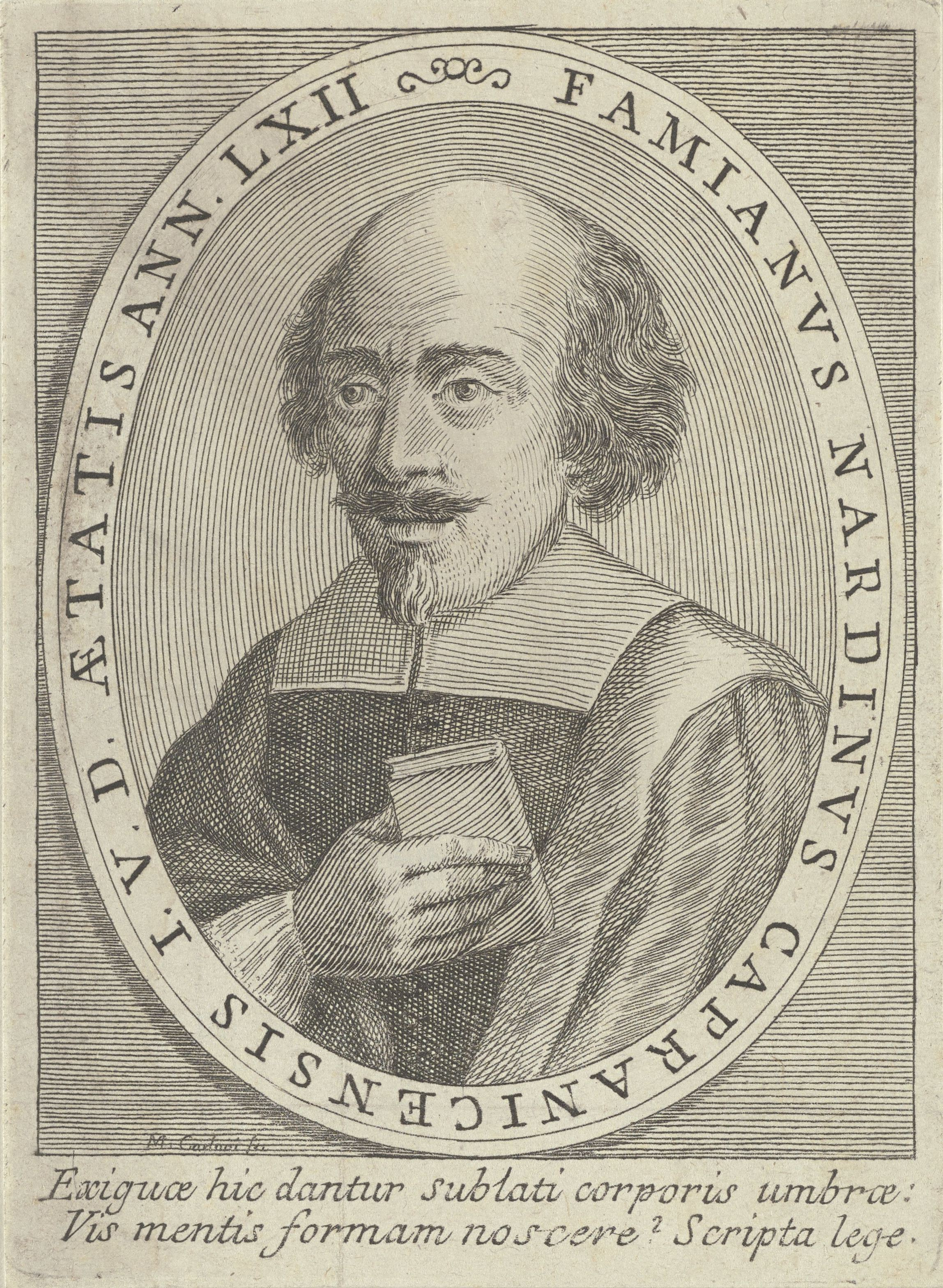 IdentificatieTitel(s): Portret van Famiano NardiniObjecttype: prent Objectnummer: RP-P-1909-4854Opschriften / Merken: verzamelaarsmerk, verso, gestempeld: Lugt 2228VervaardigingVervaardiger: prentmaker: Marco CarloniPlaats vervaardiging: ItaliëDatering: in of na 1661Fysieke kenmerken: etsMateriaal: papier Techniek: etsenAfmetingen: plaatrand: h 157 mm × b 116 mmOnderwerpWat: historical personshistory and archaeology (+ scholar, scientist in non-work situations)Wie: Famiano NardiniVerwerving en rechtenVerwerving: aankoop 1905Copyright: Publiek domein